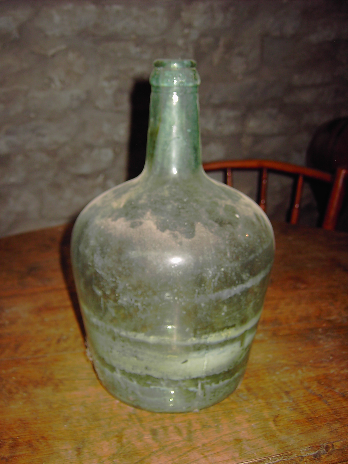 Garrafón